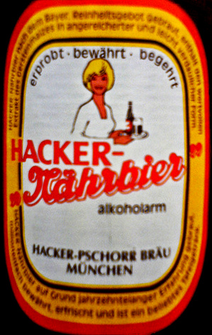 Etikett "Hacker-Nährbier", 2008 vom Markt genommen